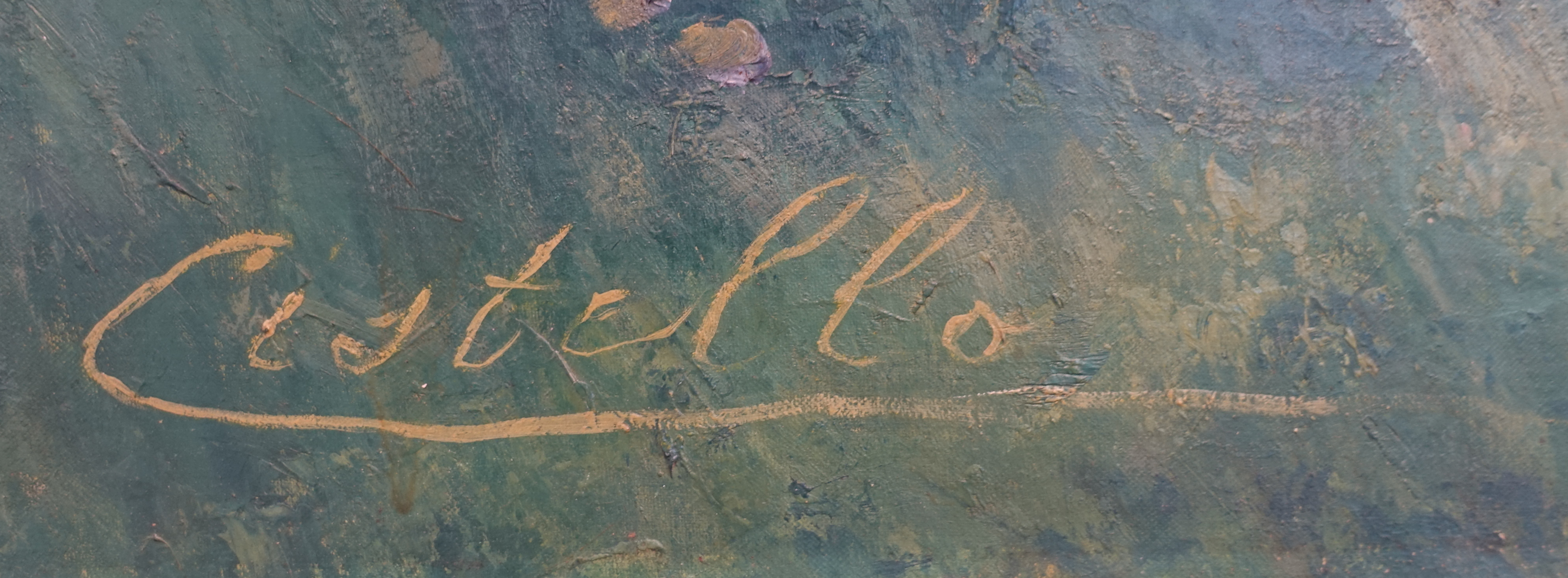 Sous les pommiers, onder de appelbomen, schilderij van Julie de Cistello, Musée de Beaux-Arts, Nice, handtekening van de schilder